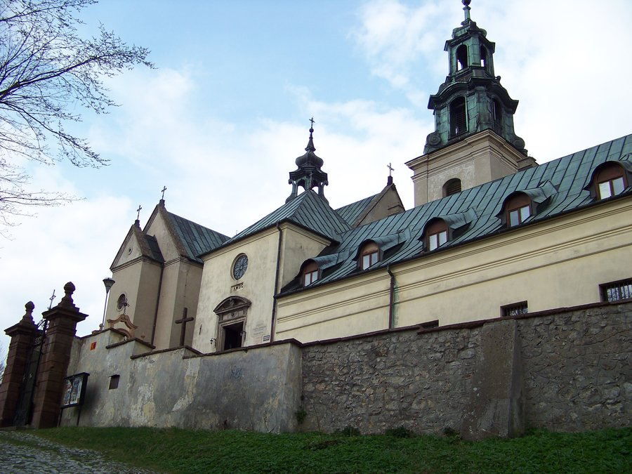 Zespół klasztorny na Karczówce: - kościół par. p.w. św. Karola Boromeusza, 1624-31 klasztor, 1629-31, XIX, zabudowania gospodarcze, 1 poł. XVIII ogrodzenie z basztami, XVII-XVIII teren niezabudowany na stoku góry, nr rej.: A-1189 z 25.08.1997